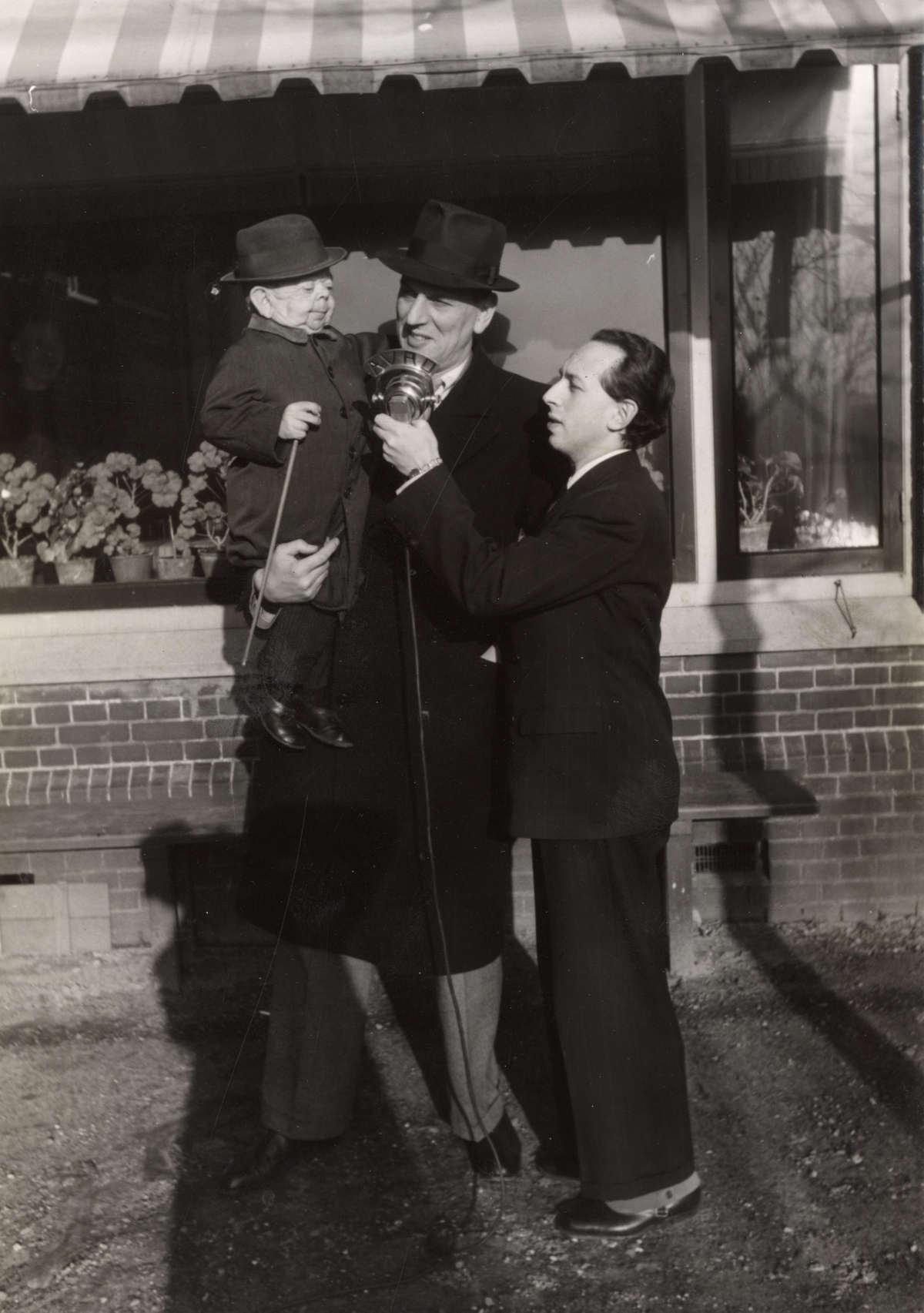 Achondroplasie, kleine mensen, dwergen, lilliputters. Dhr Keizer, de kleinste man van Nederland (98 cm) is 65 jaar oud geworden, Loosduinen, Nederland 1939. Foto: Dhr Keizer spreekt op zijn 65e verjaardag voor de radio, de AVRO radio-reporter Gustav "Gustaaf" Czopp houdt hem een microfoon voor, terwijl hij op de arm gehouden wordt (door AVRO-collega Tom Schreurs). Collectie / Archief Het Leven (LEVEN 022)